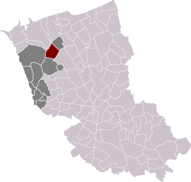 Locatie gemeente Broekkerke in arrondissement Duinkerke. Zelfgemaakt. Location of Brouckerque municipality in the arrondissement of Dunkirk. Self made. Localisation de la commune de Brouckerque dans l'arrondissement de Dunkerque. Fait moi-même.